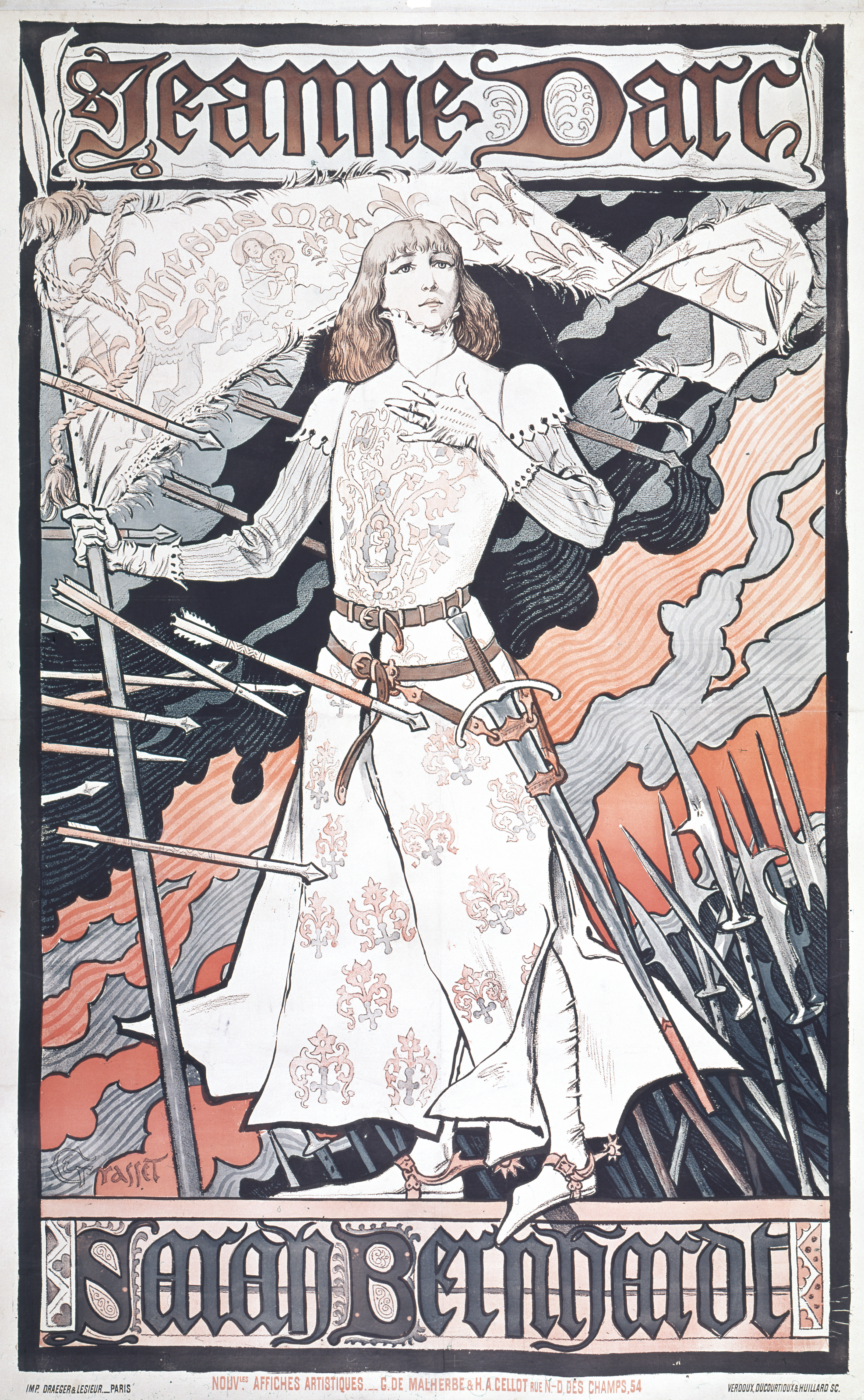 Affiche de Sarah Bernhardt dans le rôle de Jeanne d'Arc. Affiche conservée à la BNF